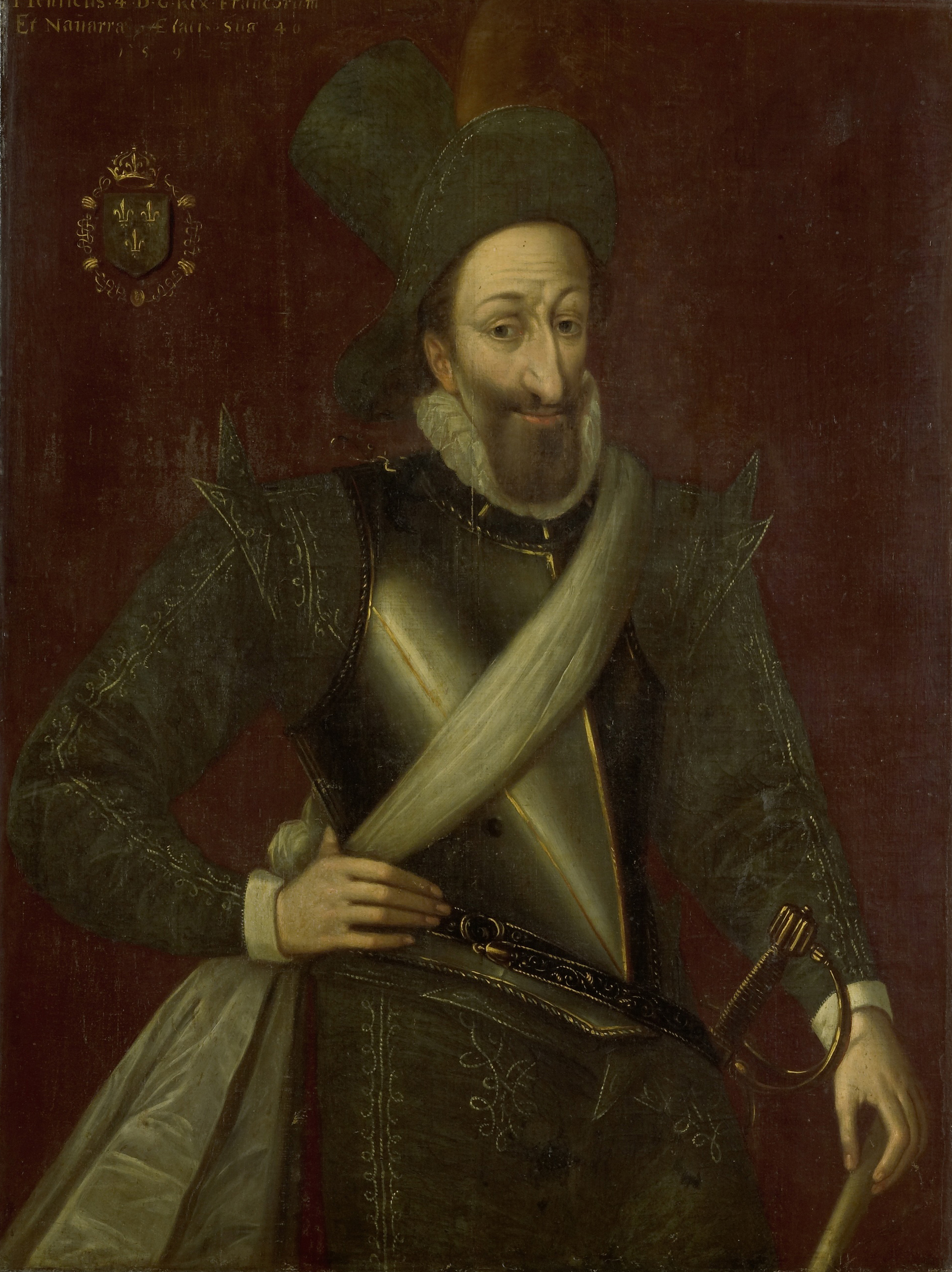 Portret van Henri IV, koning van Frankrijk. Staande met een sjerp over het kuras. Op het hoofd een gepluimde hoed.